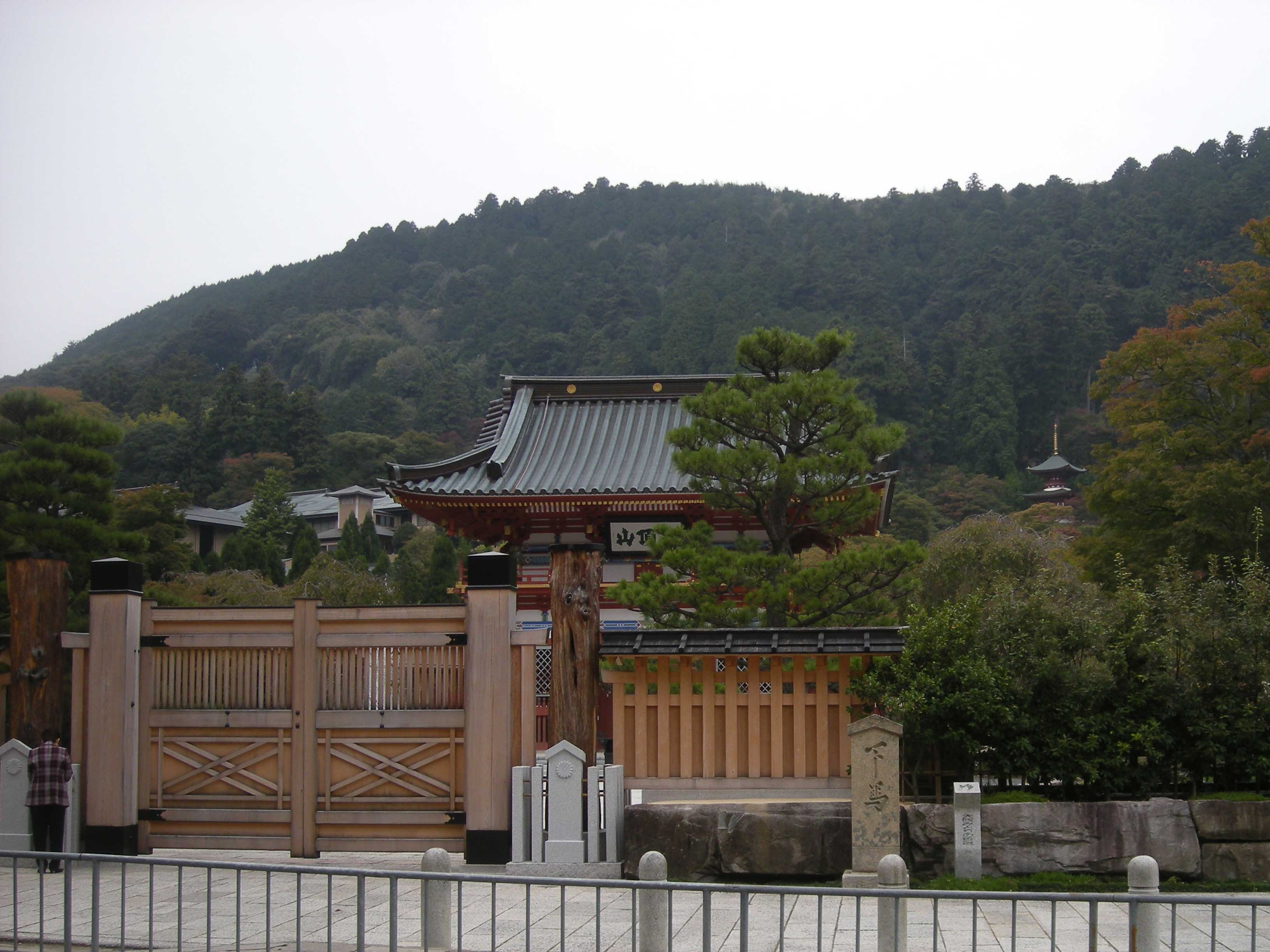 勝尾寺 最勝ヶ峰